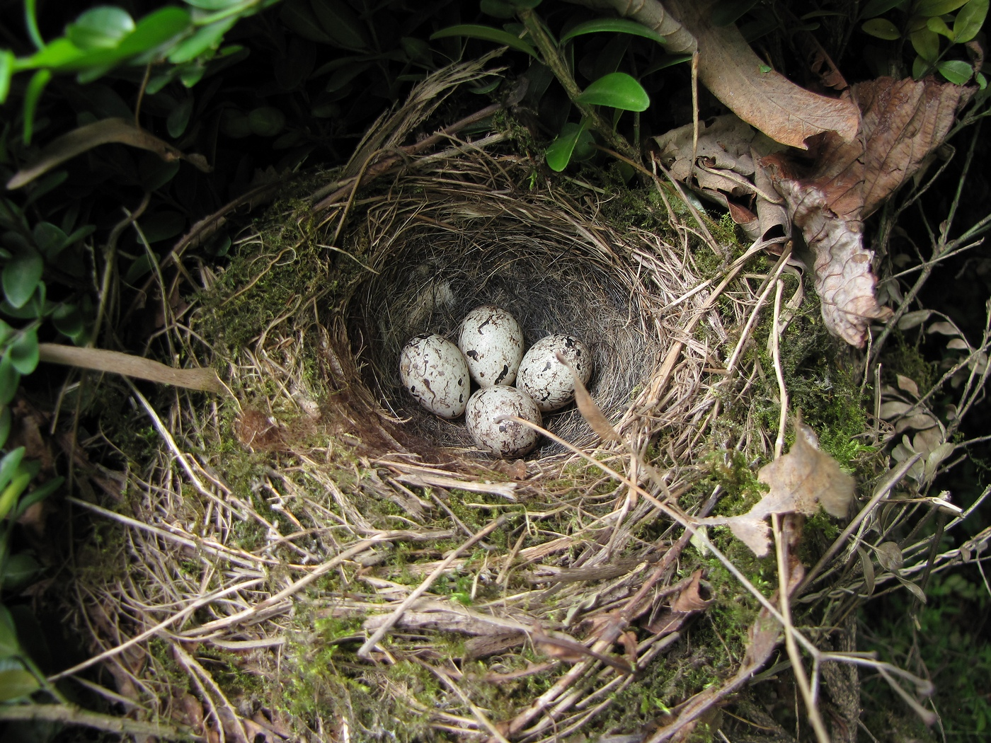 Srpski naziv crnogrla strnadica Opis vrste D.t. 15-16,5 cm. Rasprostranjena je u većem delu zapadne, južne i jugoistočne Evrope, u delu Male Azije i severozapadne Afrike. Stanarica je. Naseljava toplija, mozaična staništa (obodi šuma ili makija, livade i živice, voćnjaci, vinogradi, vrtovi, parkovi i sl) u pobrđu i brdskim predelima. Gnezda gradi blizu tla, skrivena u vegetaciji. Hrani se pretežno semenjem različitih biljaka, dok u periodu podizanja mladunaca insekti čine značajan deo ishrane. Ugrožava je nestanak staništa usled intenziviranja poljoprivrede. U Srbiji je redovna gnezdarica mozaičnih predela brdsko-planinskog dela zemlje. Gnezdeća populacija se procenjuje na 13.000-18.000 parova (Puzović et al 2009). Status zaštite vrste IUCN crvena lista - Kategorija LC; Ptice od posebnog značaja za zaštitu u Evropi: Non SPEC e; Konvencija o očuvanju evropske divlje flore i faune i prirodnih staništa - Annex I; Pravilnik o proglašenju i zaštiti strogo zaštićenih i zaštićenih divljih vrsta biljaka, životinja i gljiva: Prilog I Strogo zaštićene divlje vrste biljaka, životinja i gljiva